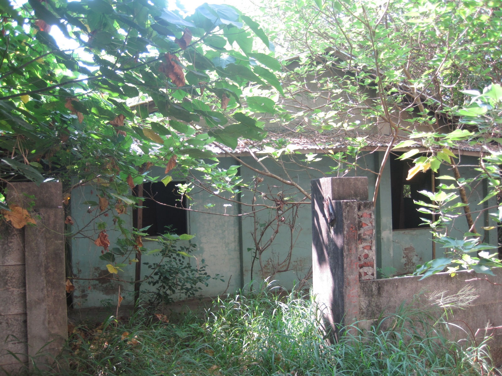 臺灣臺南市永康區飛雁新村的建物。